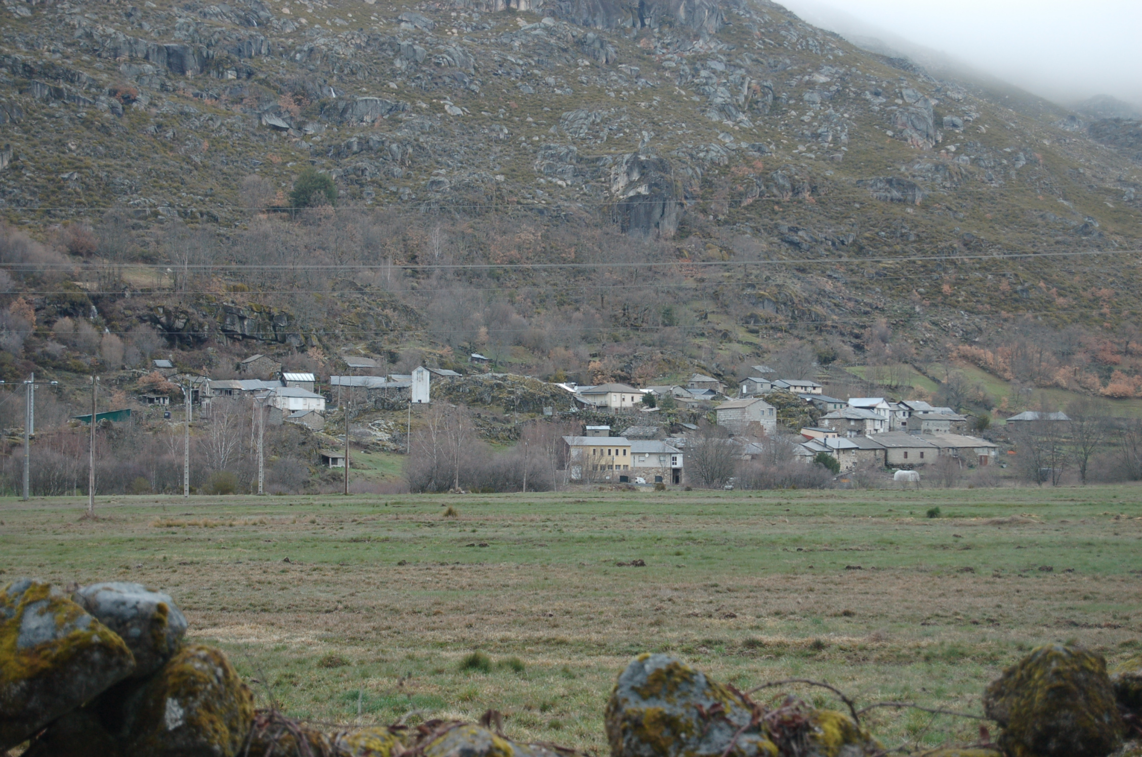 Vista da aldea de Pradorramisquedo, Viana do Bolo